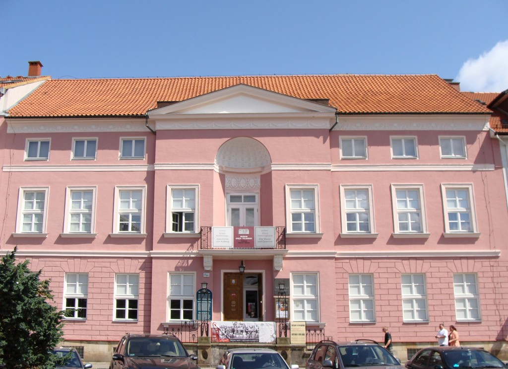 Kołobrzeg, Pałac rodziny Brunszwickich (von Braunschweig) Pochodzący z początku XIX w. budynek w stylu empire o oryginalnej fasadzie. Obecnie muzeum.